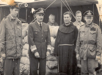 El ingeniero aeronáutico Aldo Zeoli junto al R.P. López y personal de Fuerza Aérea tras el exitoso lanzamiento del Alfa Centauro en Pampa de Achala.